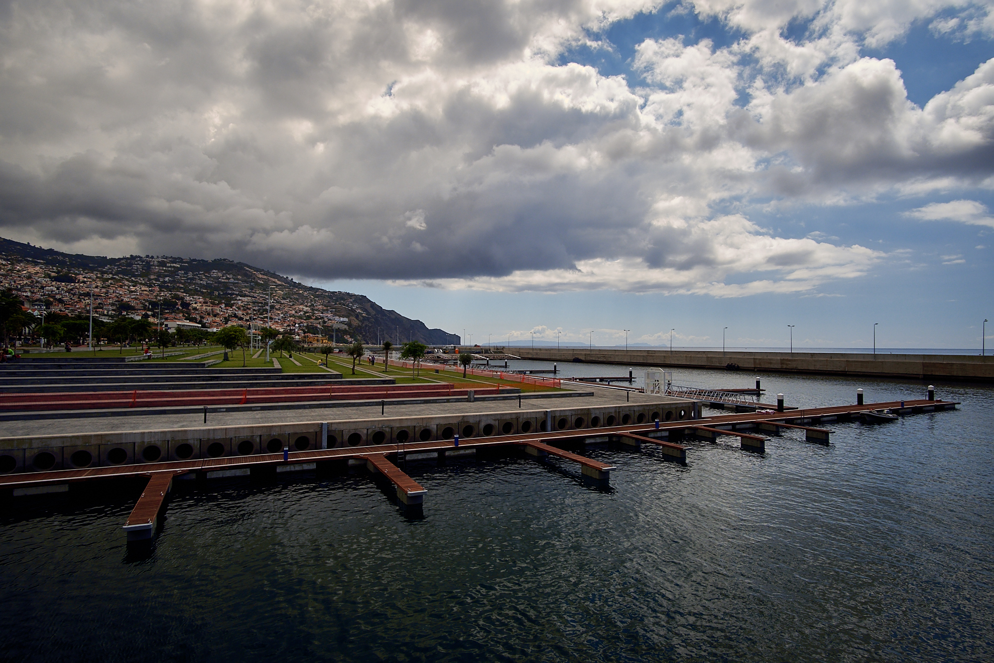 Madera 08'2015